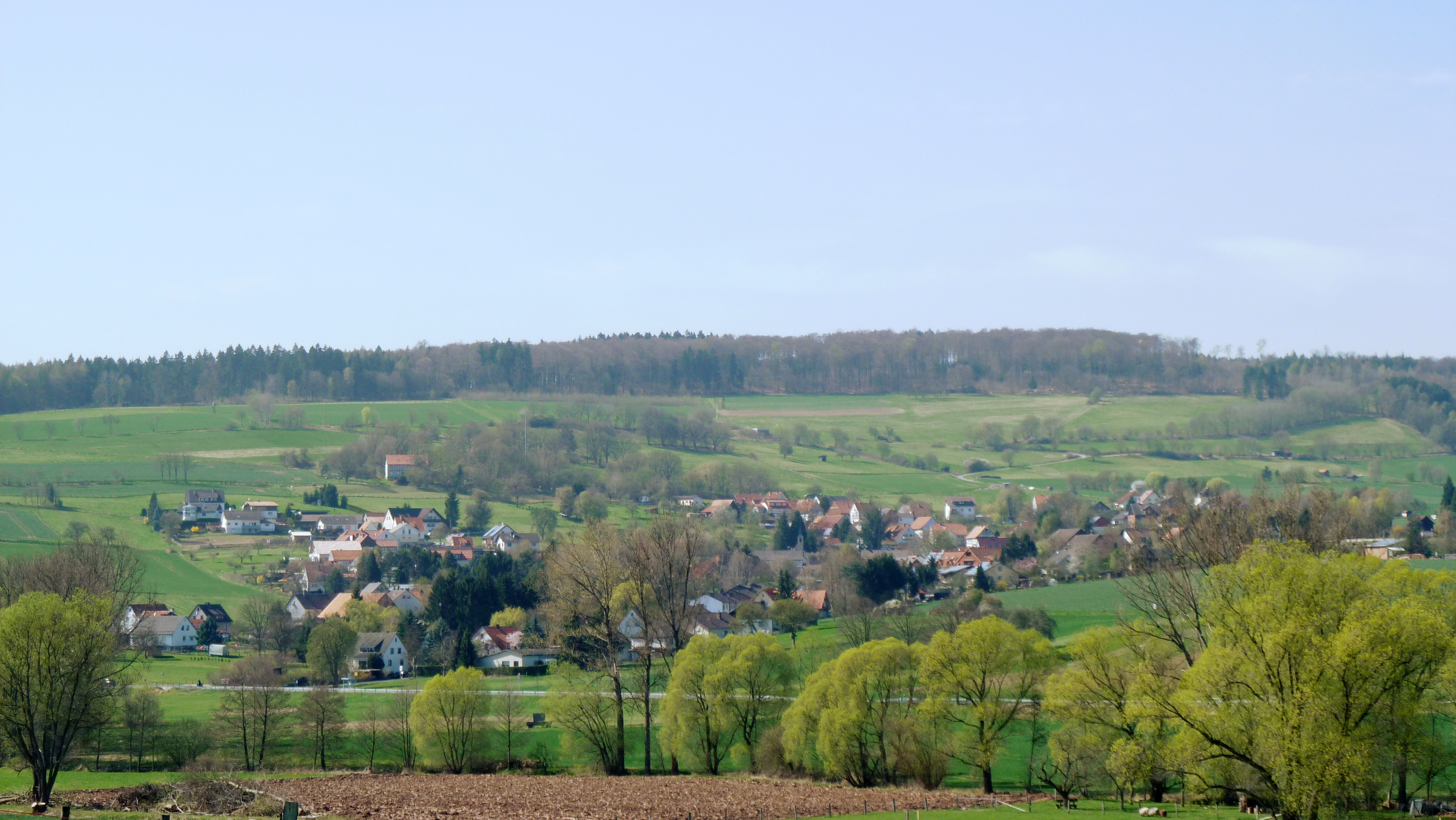 Blick von Ostsüdosten auf Mielenhausen, Stadt Hann. Münden, Südniedersachsen. Im Hintergrund der Bramwald